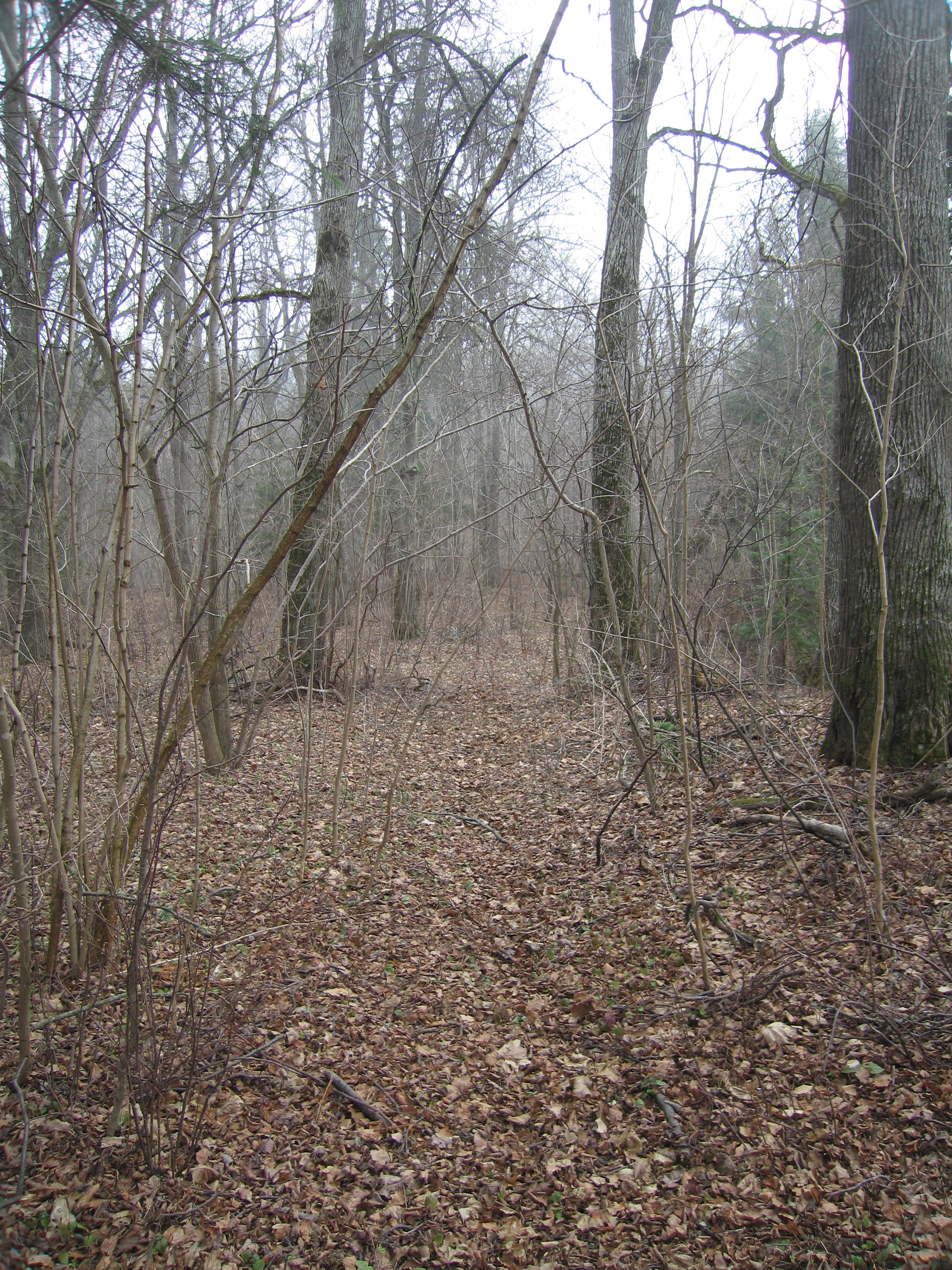 Tee kalmistule